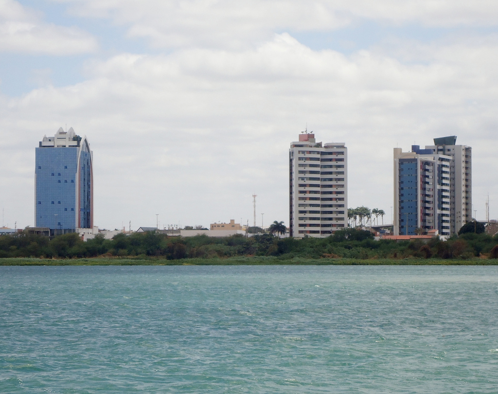 Orla II - Petrolina-PE